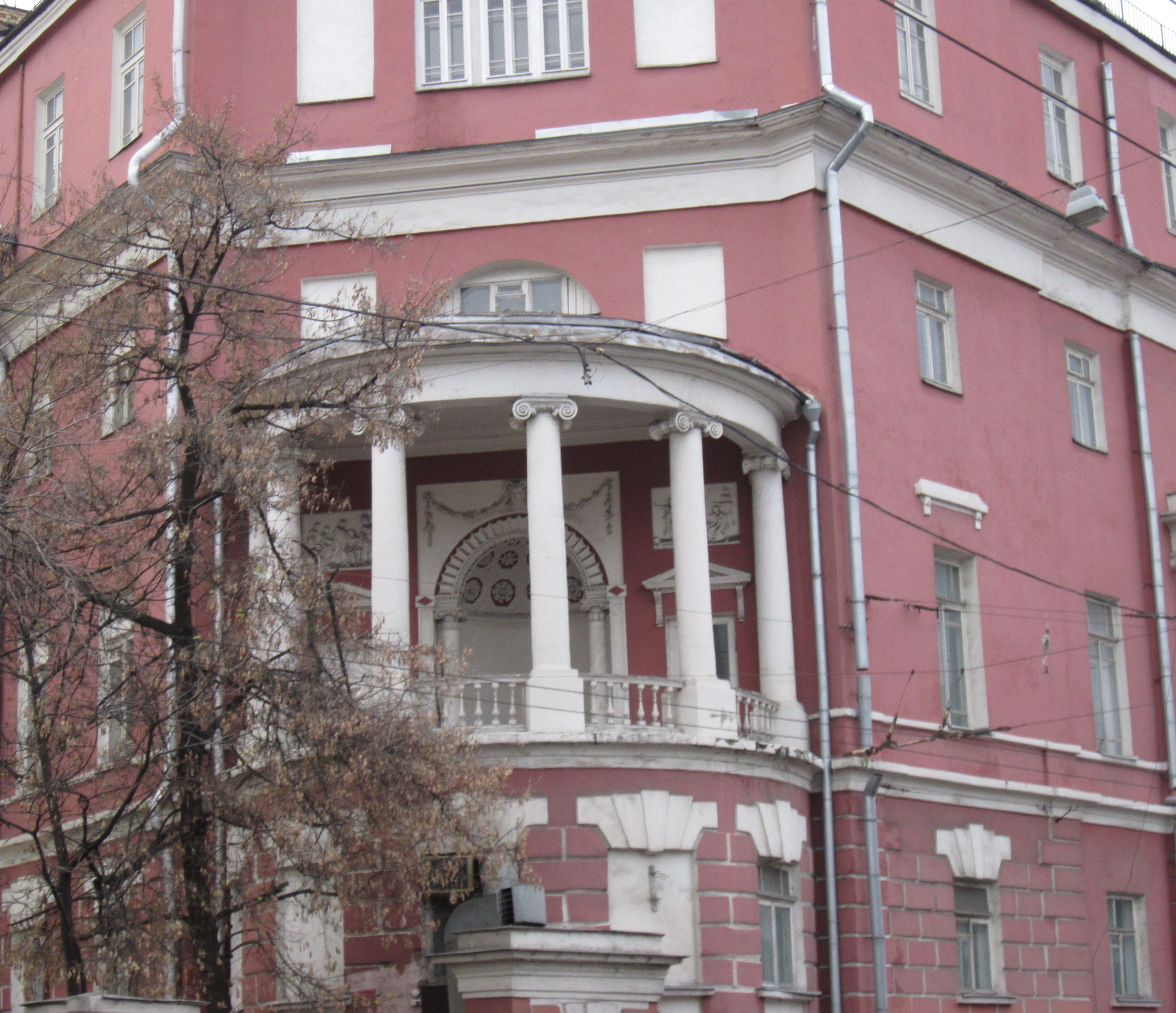 Полуротонда на заднем углу здания МГСУ (Спартаковская, 2/1)